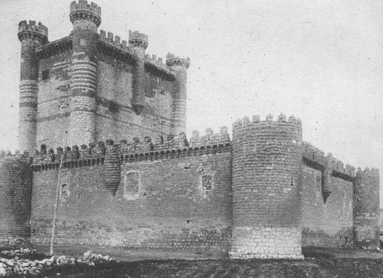 Castillo - Fuensaldaña (Valladolid) - España Turística y Monumental / Cuarto álbum / Las Bellezas de Castilla / Región Leonesa - Cromo 90 x 70 Sepia